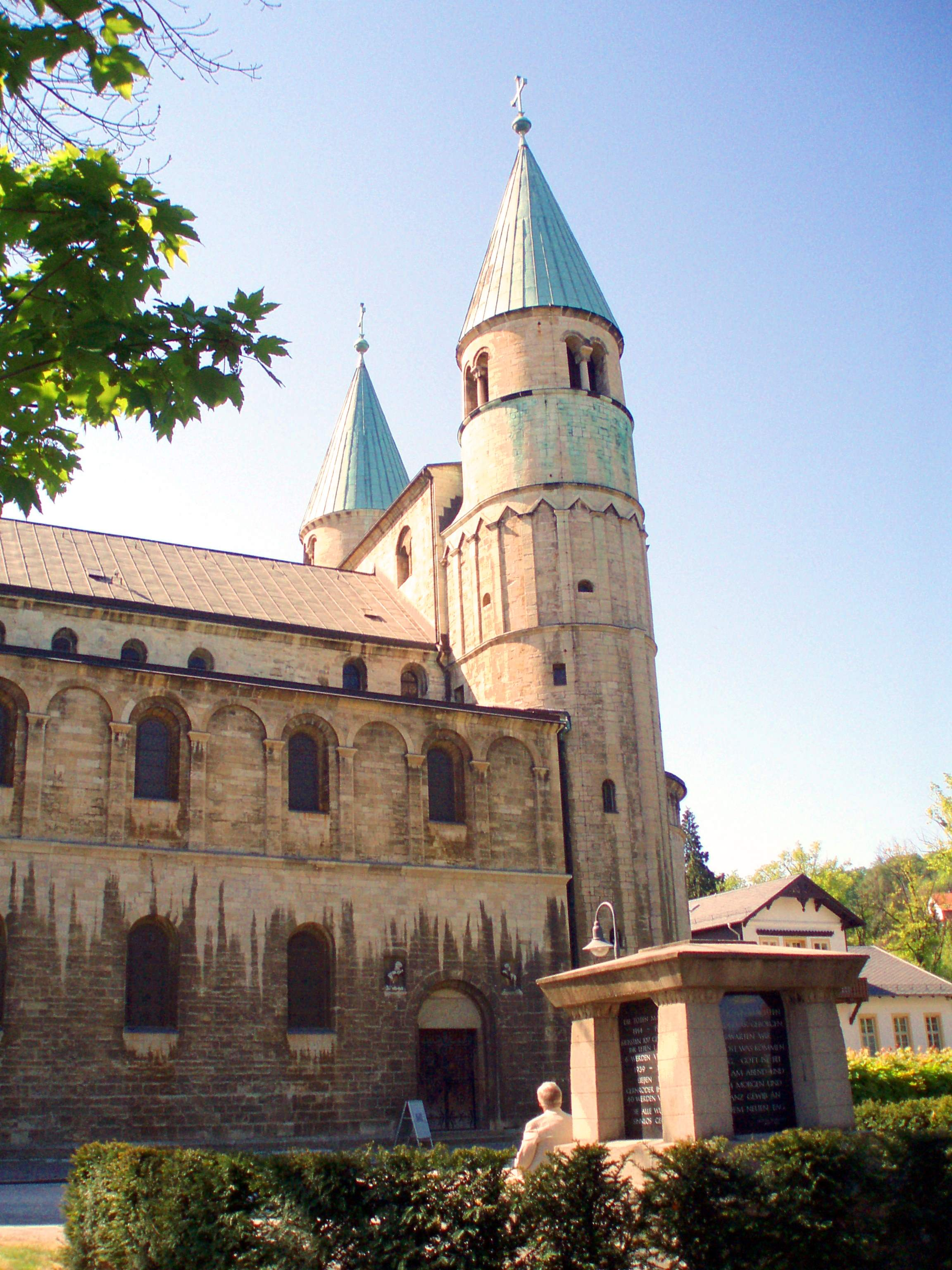 Nordseite mit Eingang der Stiftskirche Gernrode